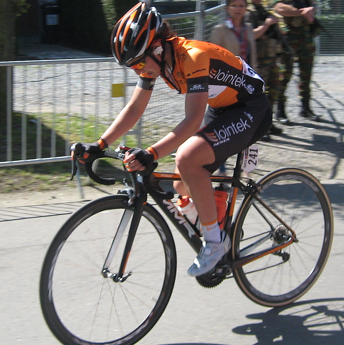 María del Mar Bonnin (Lointek) in Waalse Pijl 2016